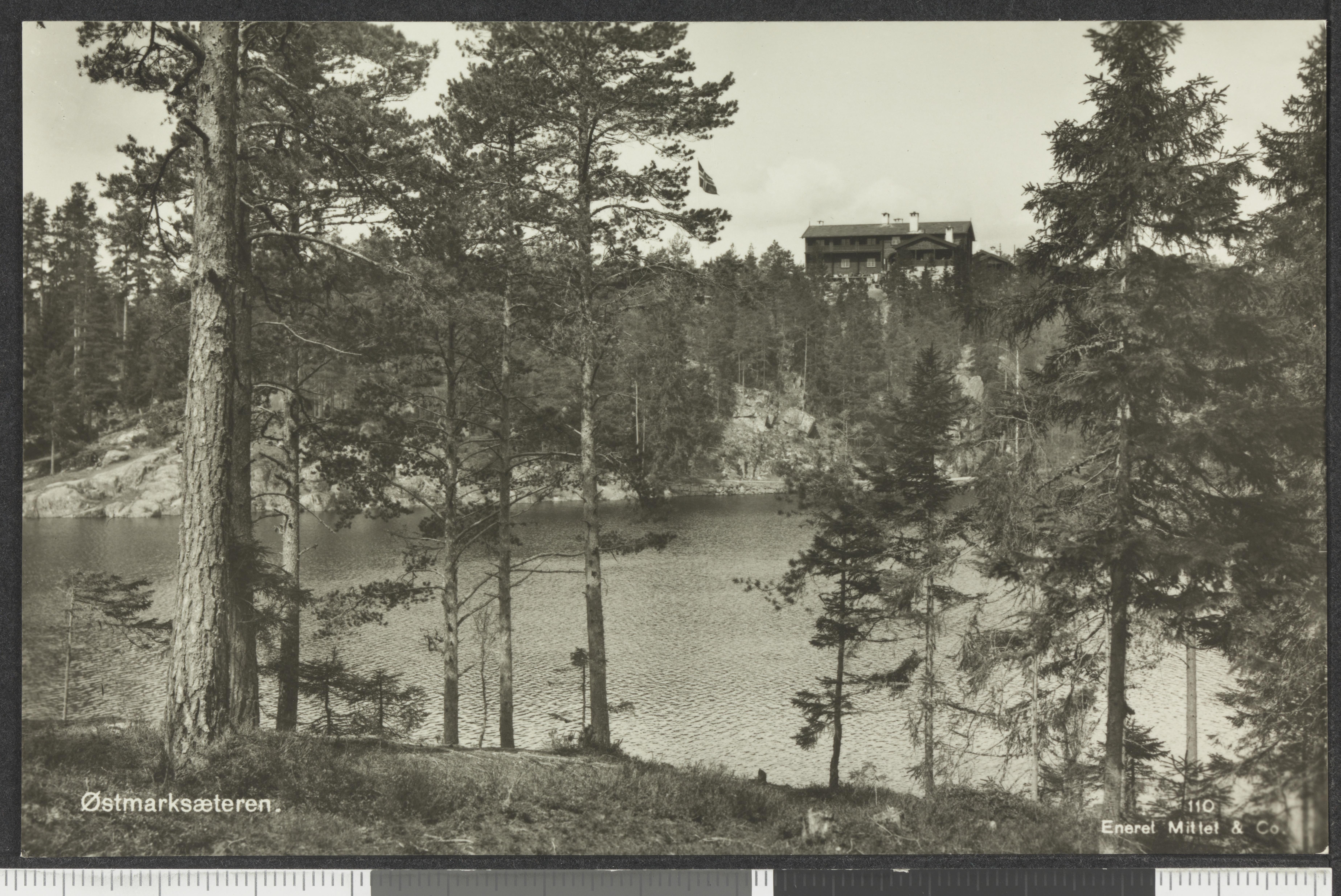 Bildet er hentet fra Nasjonalbibliotekets bildesamling Østmarka,Østmarksetra, Oslo, Oslo